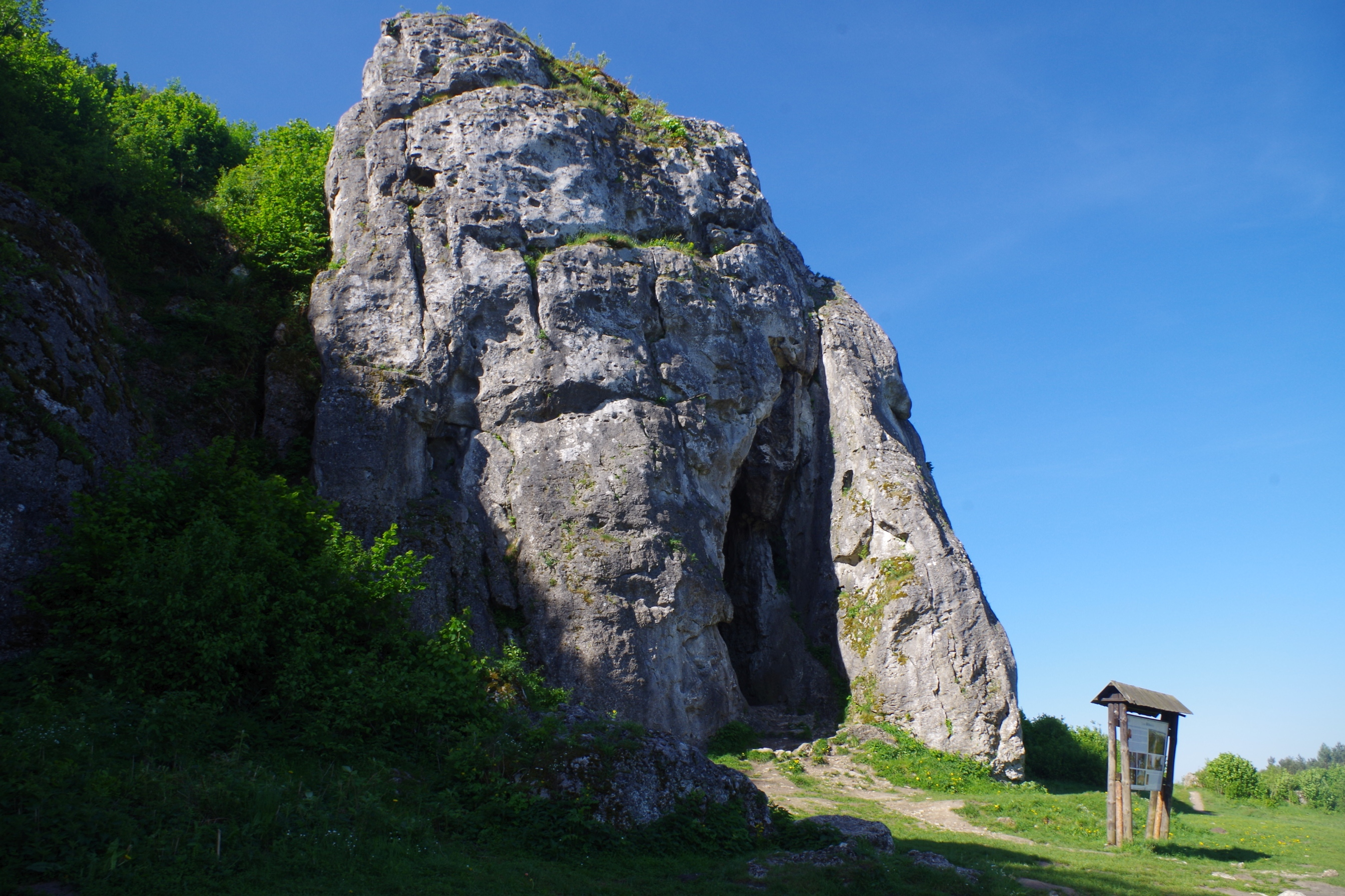 Jaskinia Stajnia